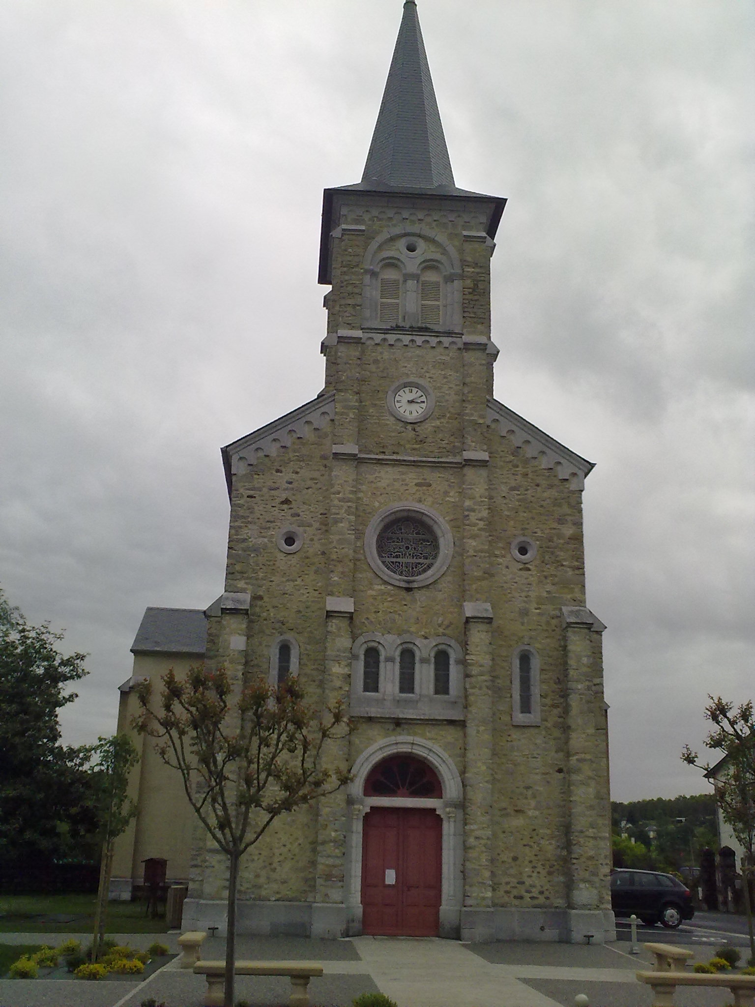 Gurmençon, France